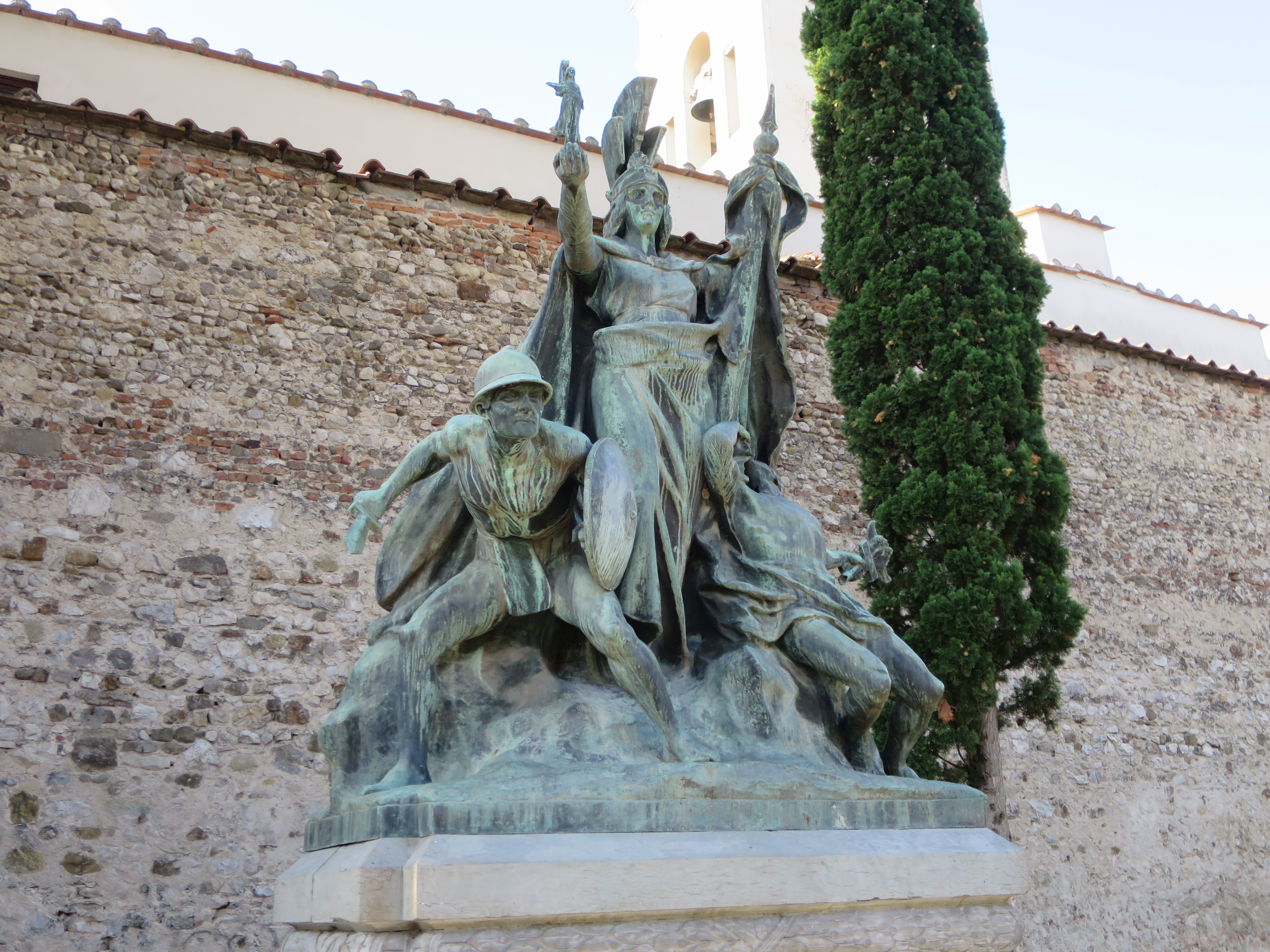 Parco della Rimembranza, Campi Bisenzio - Monumento ai caduti This is a photo of a monument which is part of cultural heritage of Italy.